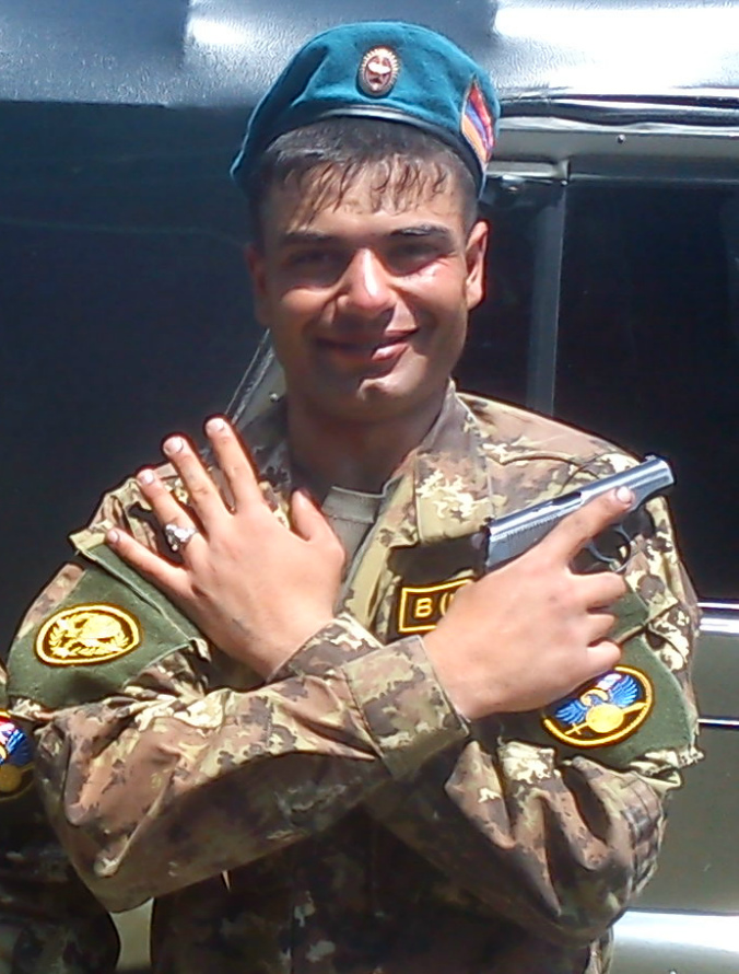 Զորիկ Գևորգյան